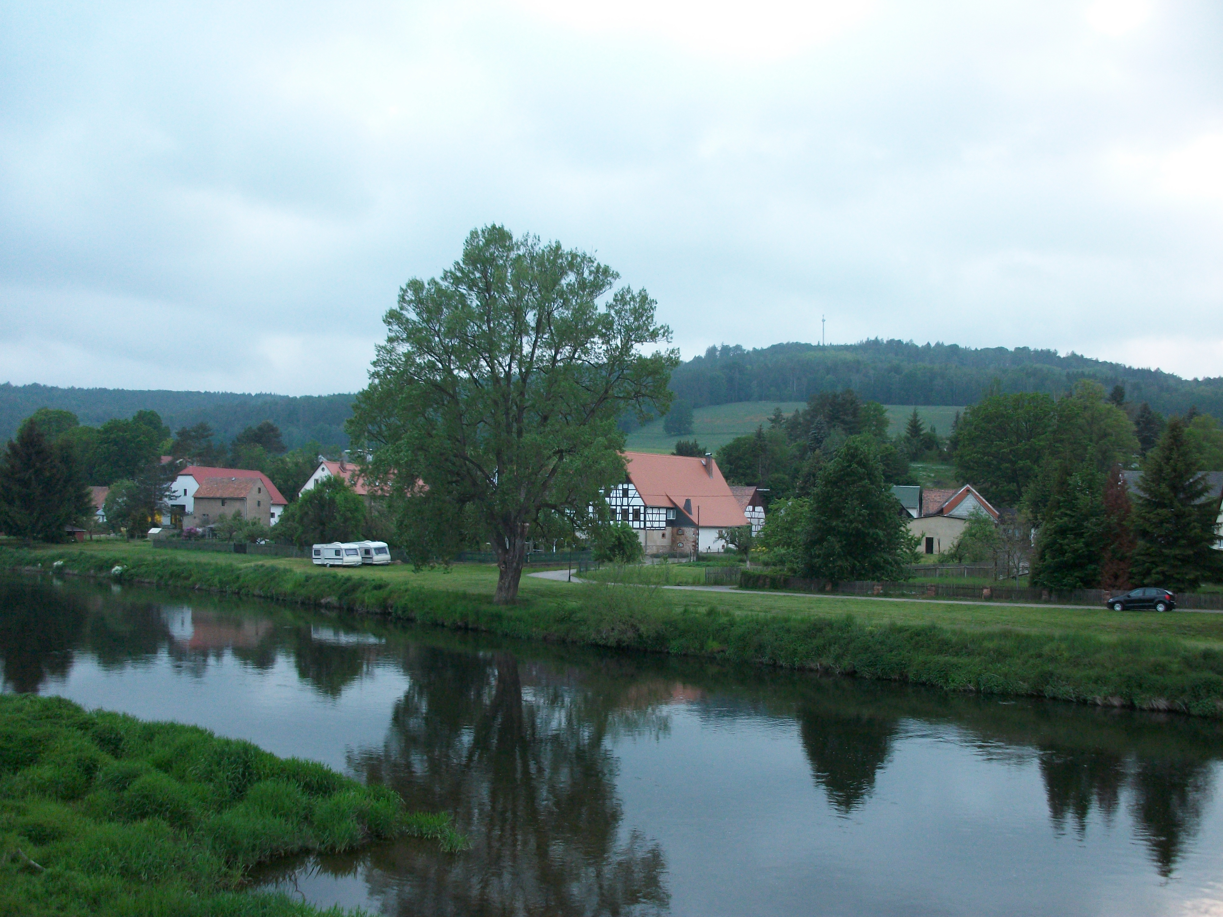 Bick auf Sörnzig